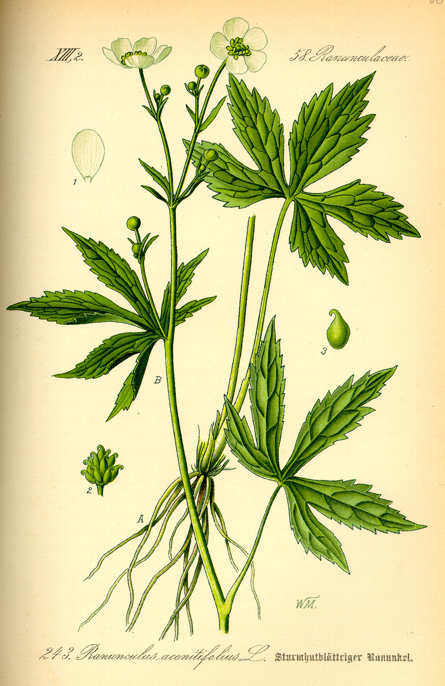 Ranunculus aconitifolius in Flora von Deutschland, Österreich und der Schweiz